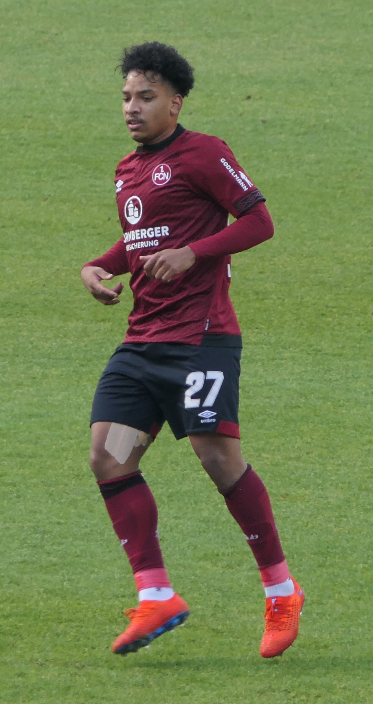 Der Fussballprofi Matheus Pereira vom 1.FC Nürnberg beim Heimspiel gegen Werder Bremen am 02.02.2019.